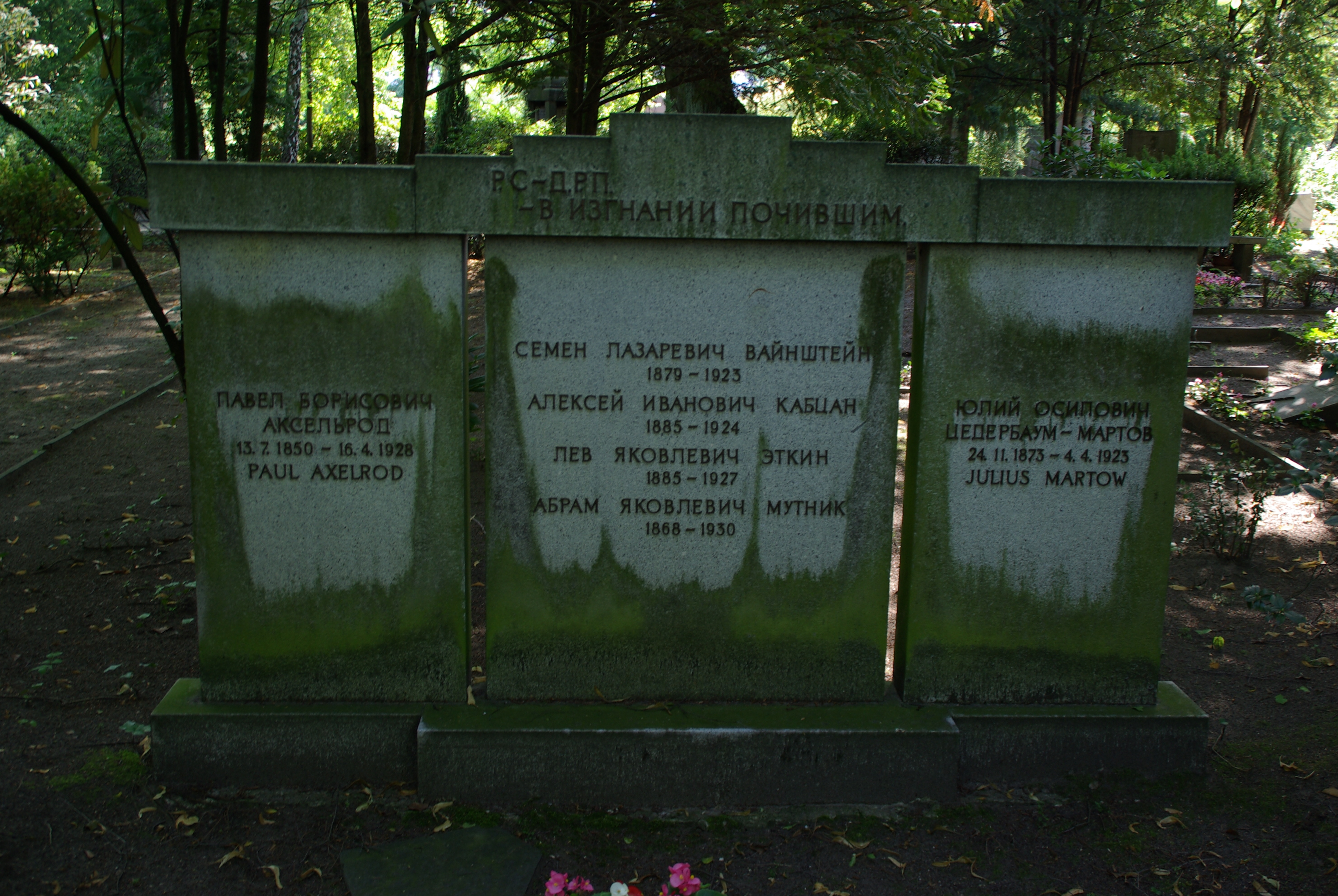 Berlin-Wedding. Der Urnenfriedhof in Berlin-Wedding steht unter Denkmalschutz. Ein Russische Grabmal, ebenfalls ein Ehrendenkmal Berlins.